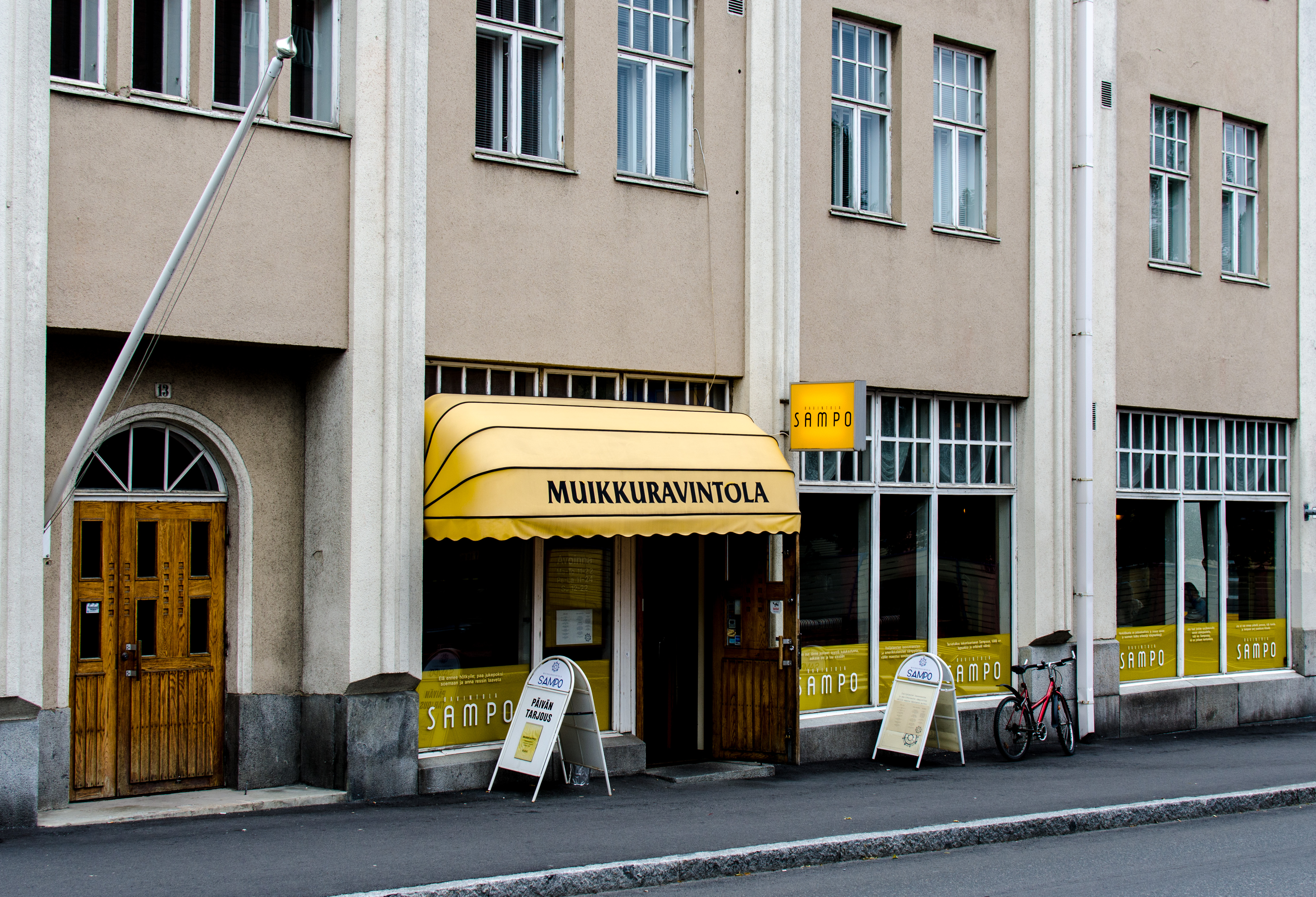 Muikkuravintola Sampo kesällä 2013